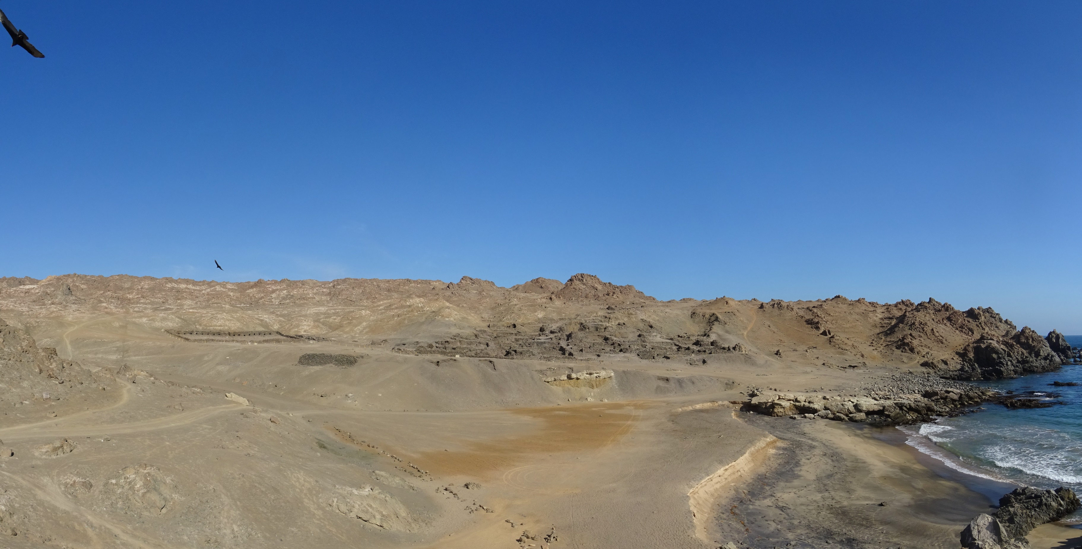 Archäologische Fundstätte Quebrada de la vaca oder Puerto Inca, nahe Chala, Provinz Arequipa, Peru